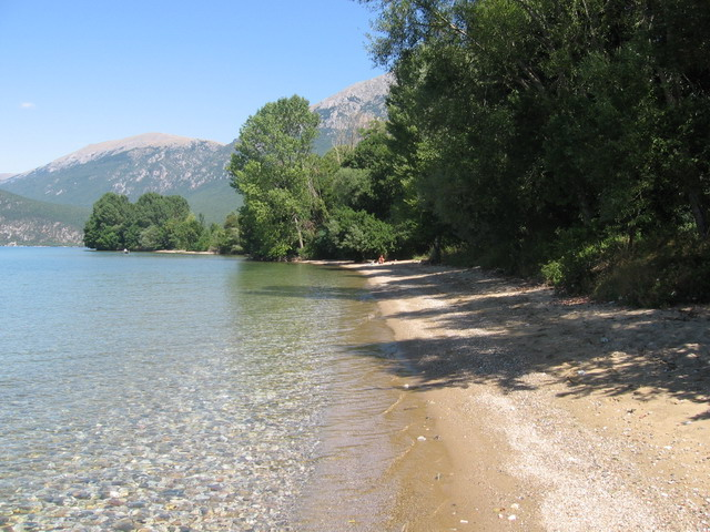 Divlja plaža između manastira Sv.Naum i kampa Ljubaništa, Ohridsko jezero